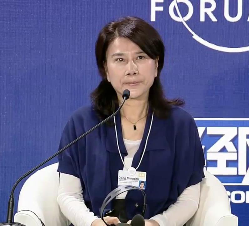 Dong Mingzhu